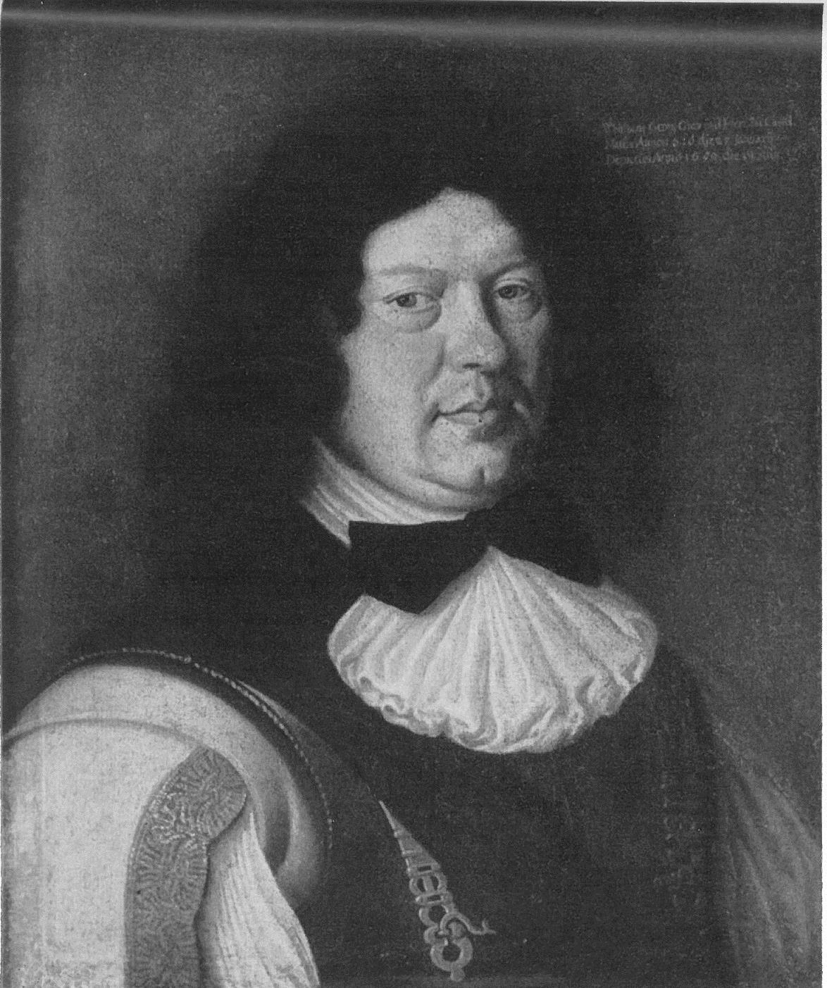 unbekannter Künstler: Wolfgang Georg I. zu Castell-Remlingen